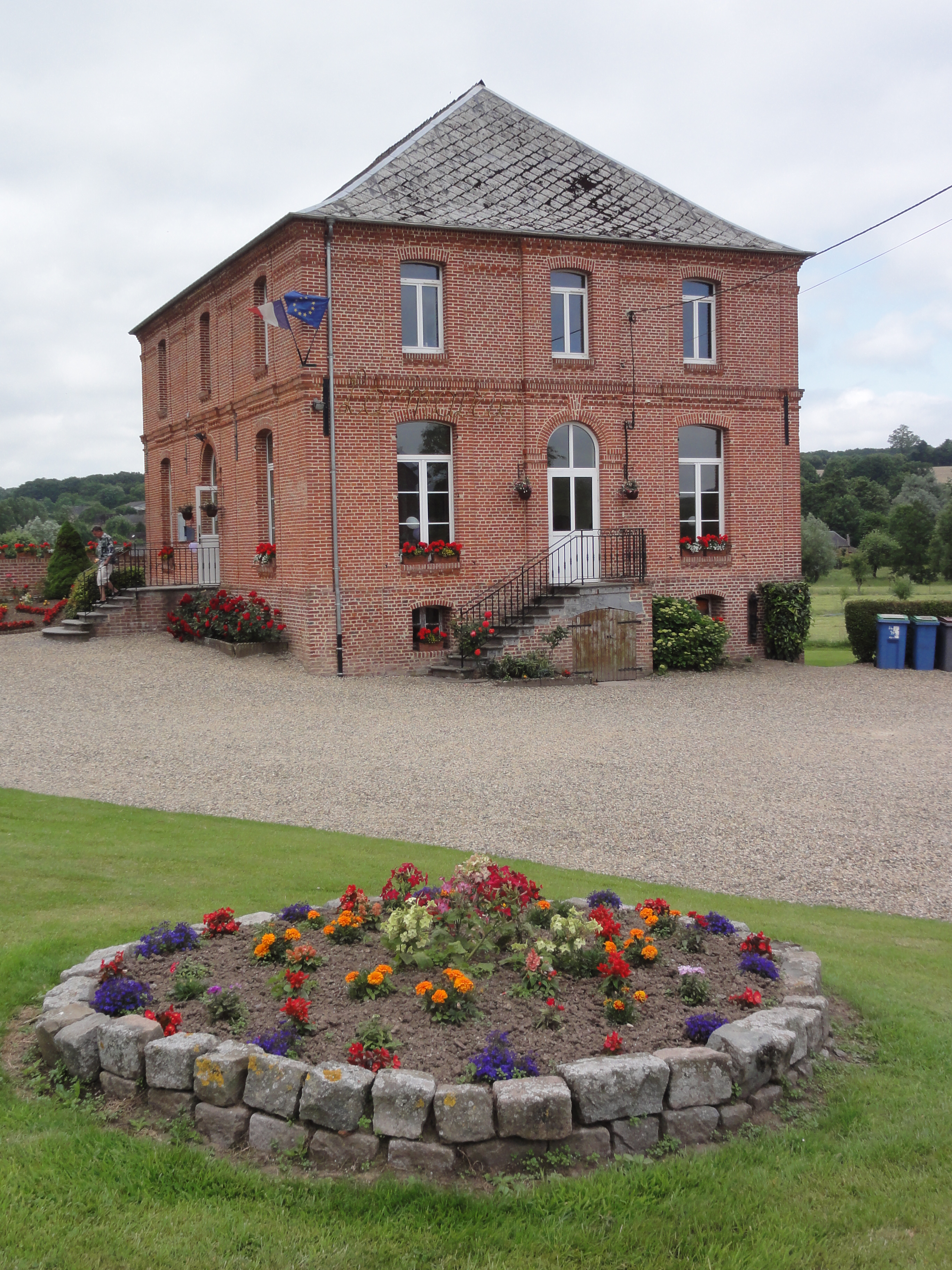 Lerzy (Aisne) mairie